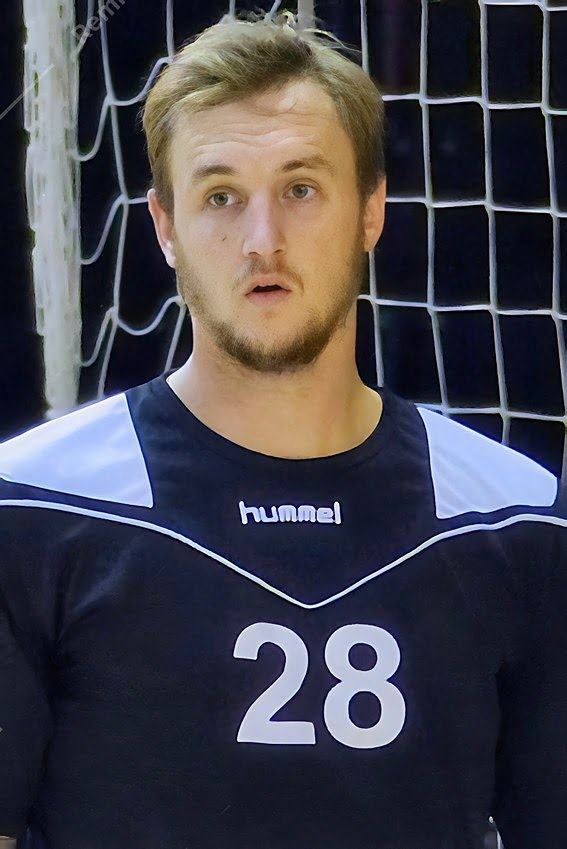 Valentin Porte au Fenix Toulouse Handball lors dela finale du Challenge Marrane contre l'US Ivry. Le 31 août 2014 à la Halle Carpentier, Paris 13e